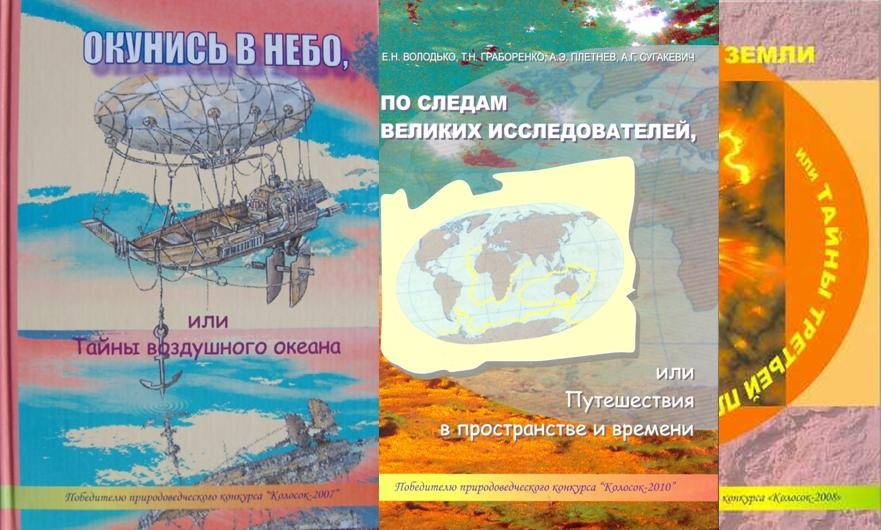 Обложки книг, изданных в качестве призов победителям конкурса "Колосок"